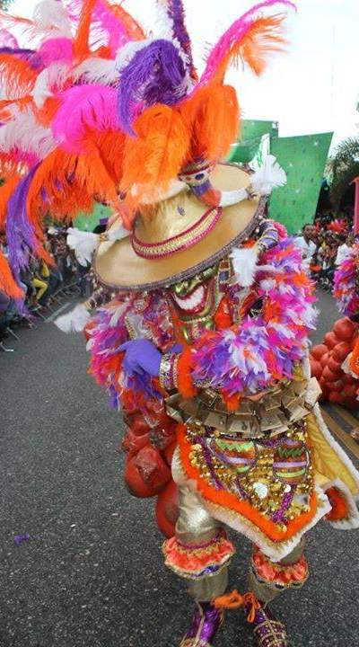 Diablo cojuelo tradicional del carnaval Dominicano